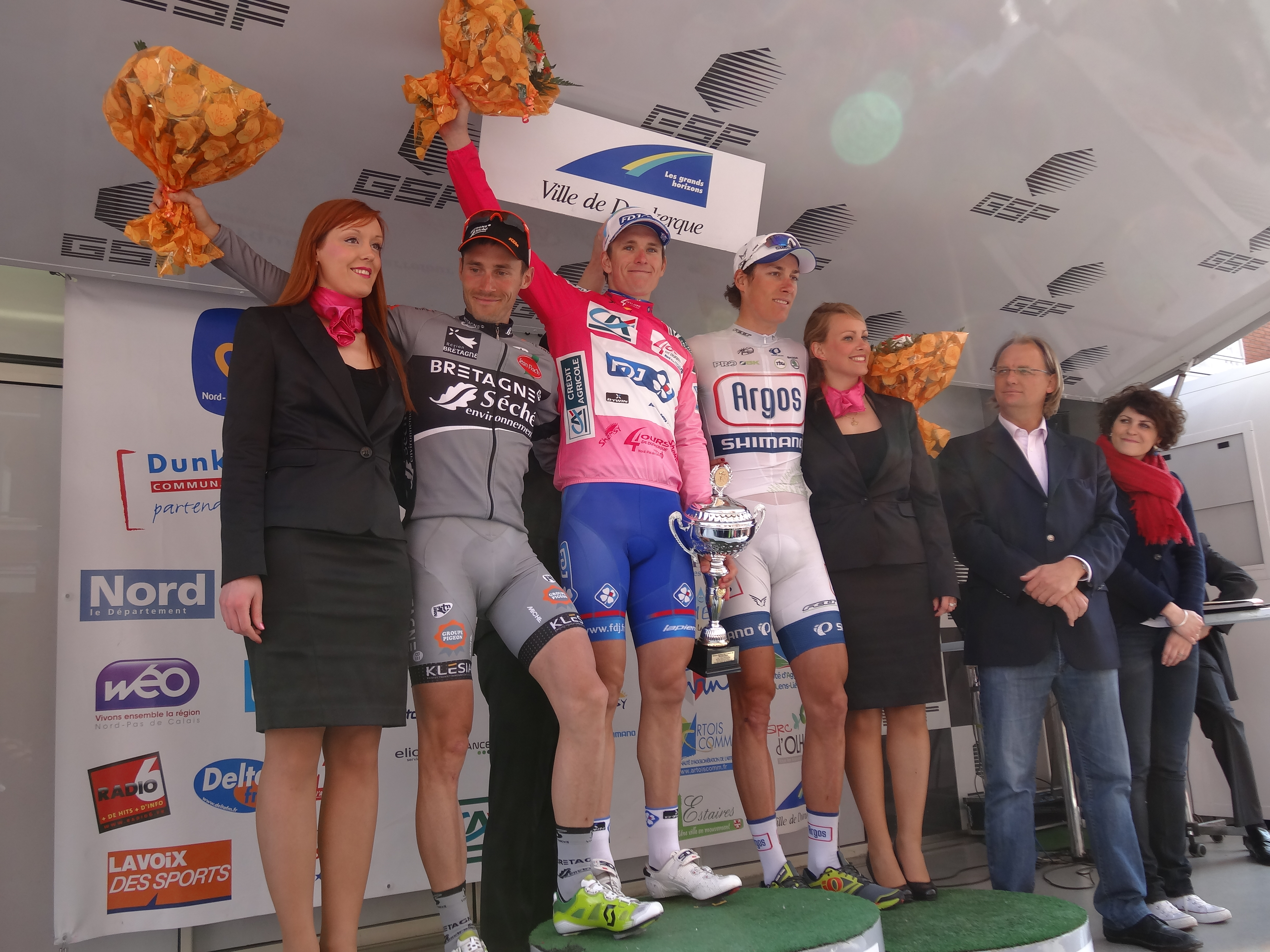 Reportage photographique réalisé le dimanche 5 mai 2013 à l'arrivée de la cinquième et dernière étape de l'édition 2013 des Quatre jours de Dunkerque à Dunkerque, Nord, Nord-Pas-de-Calais, France. Depicted people: Florian Vachon, Arnaud Démare and Ramon Sinkeldam